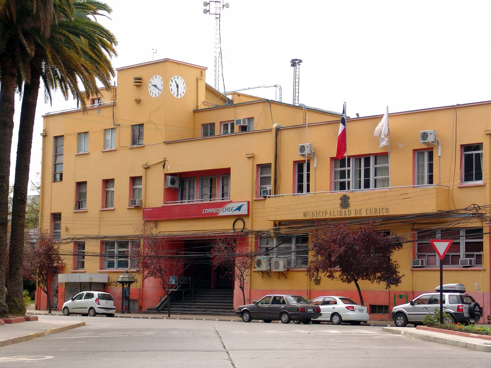 Curico municipalidad